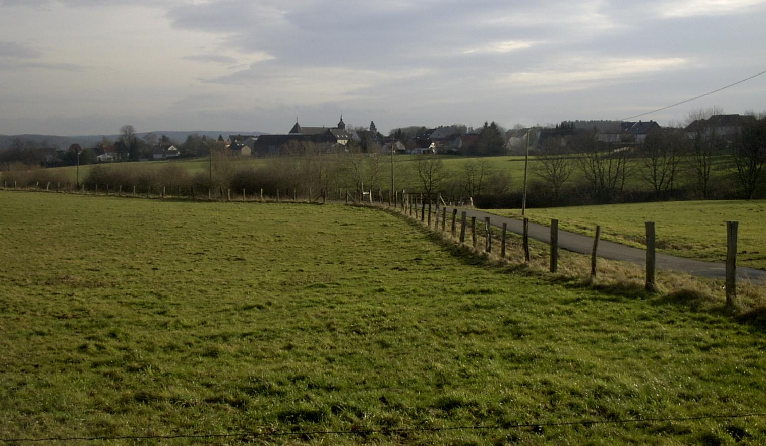 Vosswinkel von Norden aus betrachtet